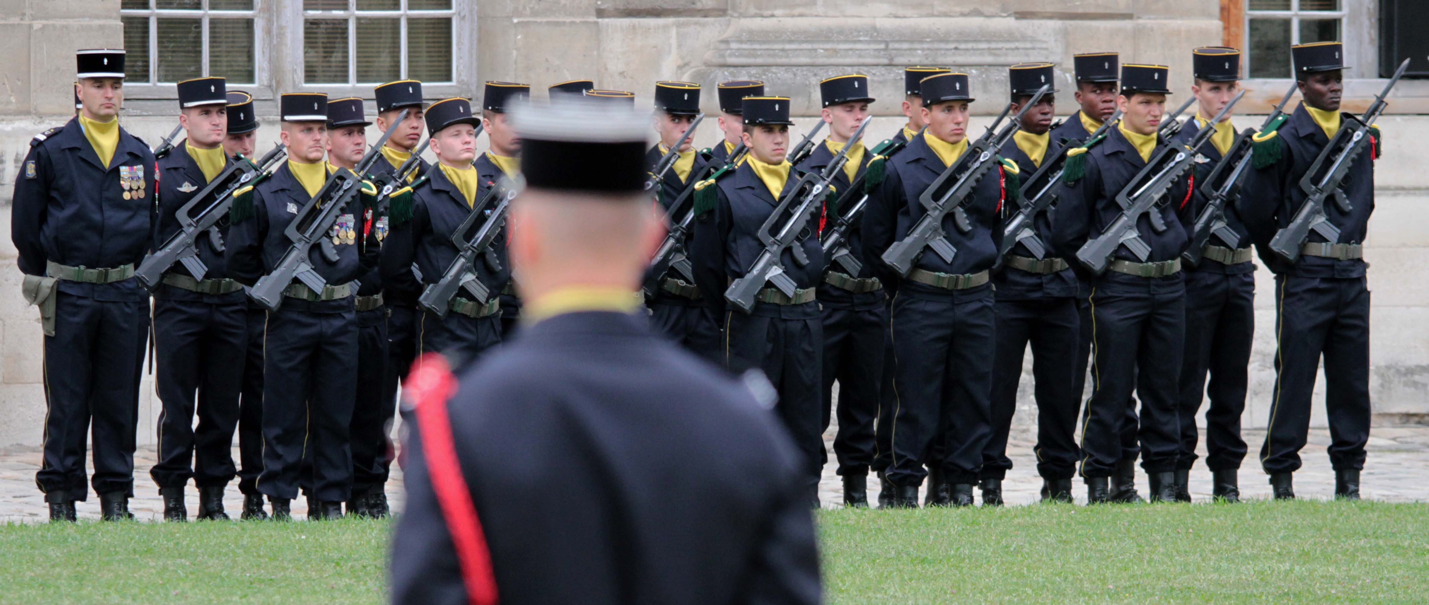 Chasseurs du 16e GC au château de Vincennes le 17/09/11